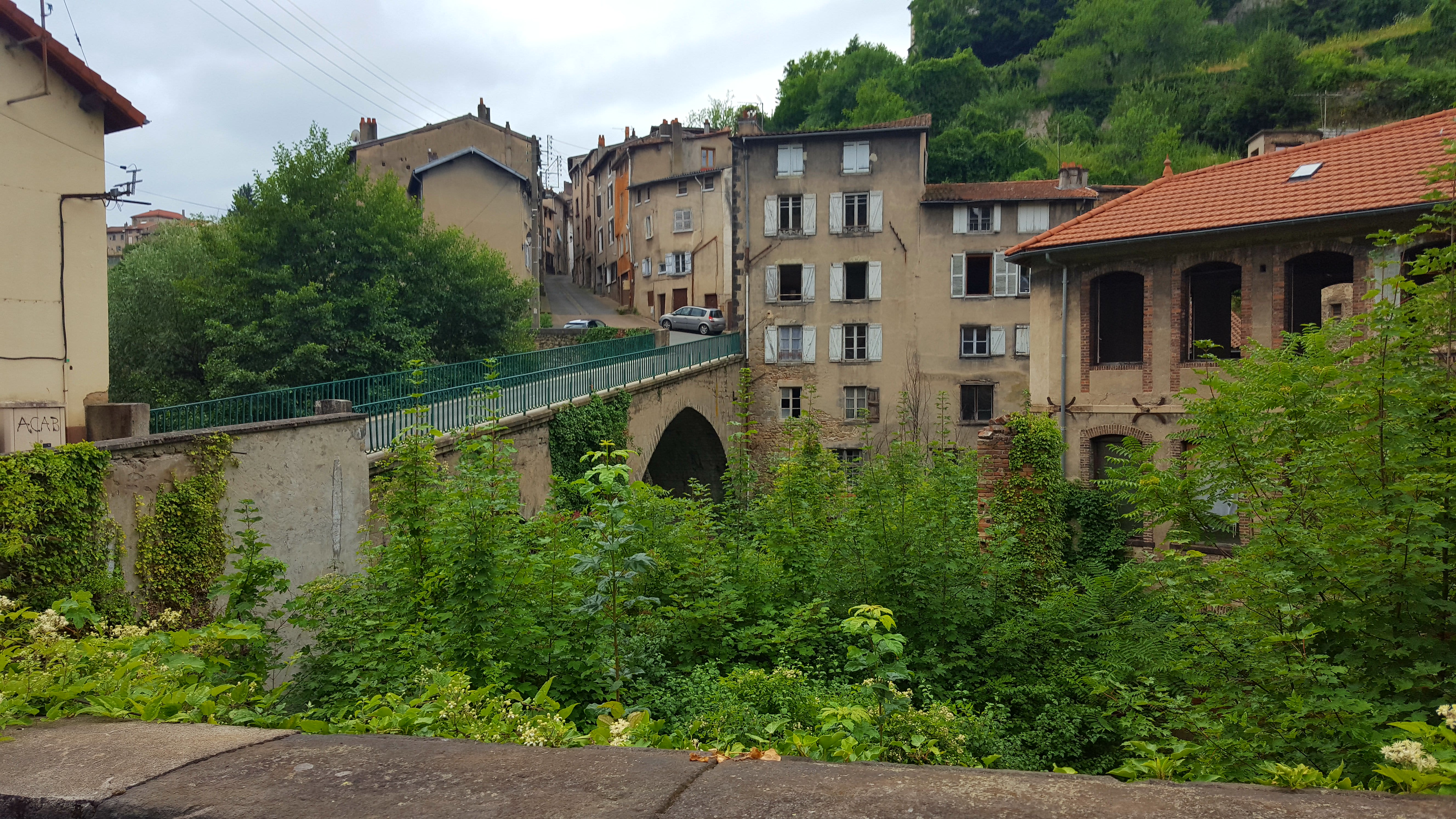 Pont médiéval à Thiers